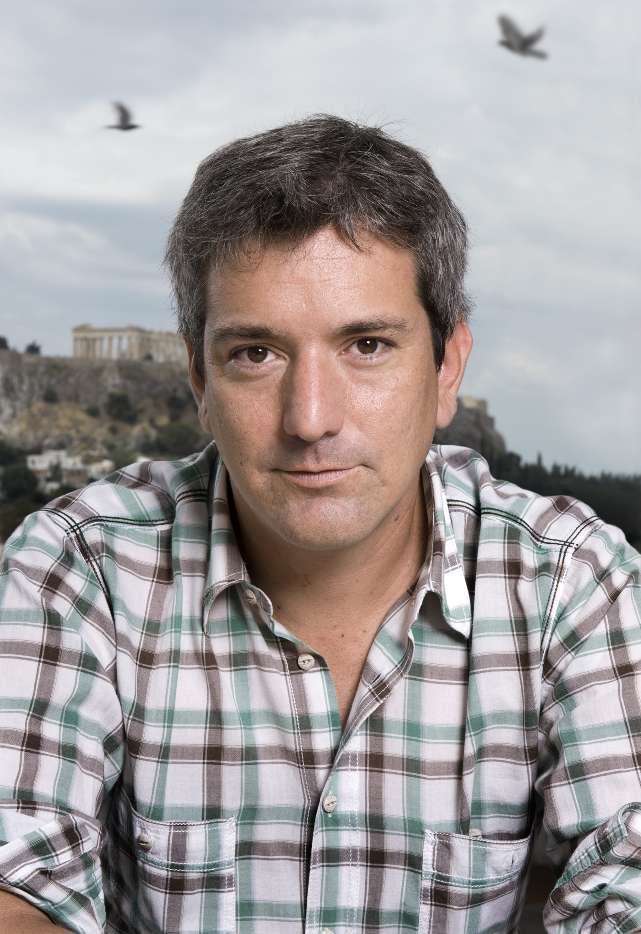 Santiago Roncagliolo en Atenas, foto de Dimitris Yeros